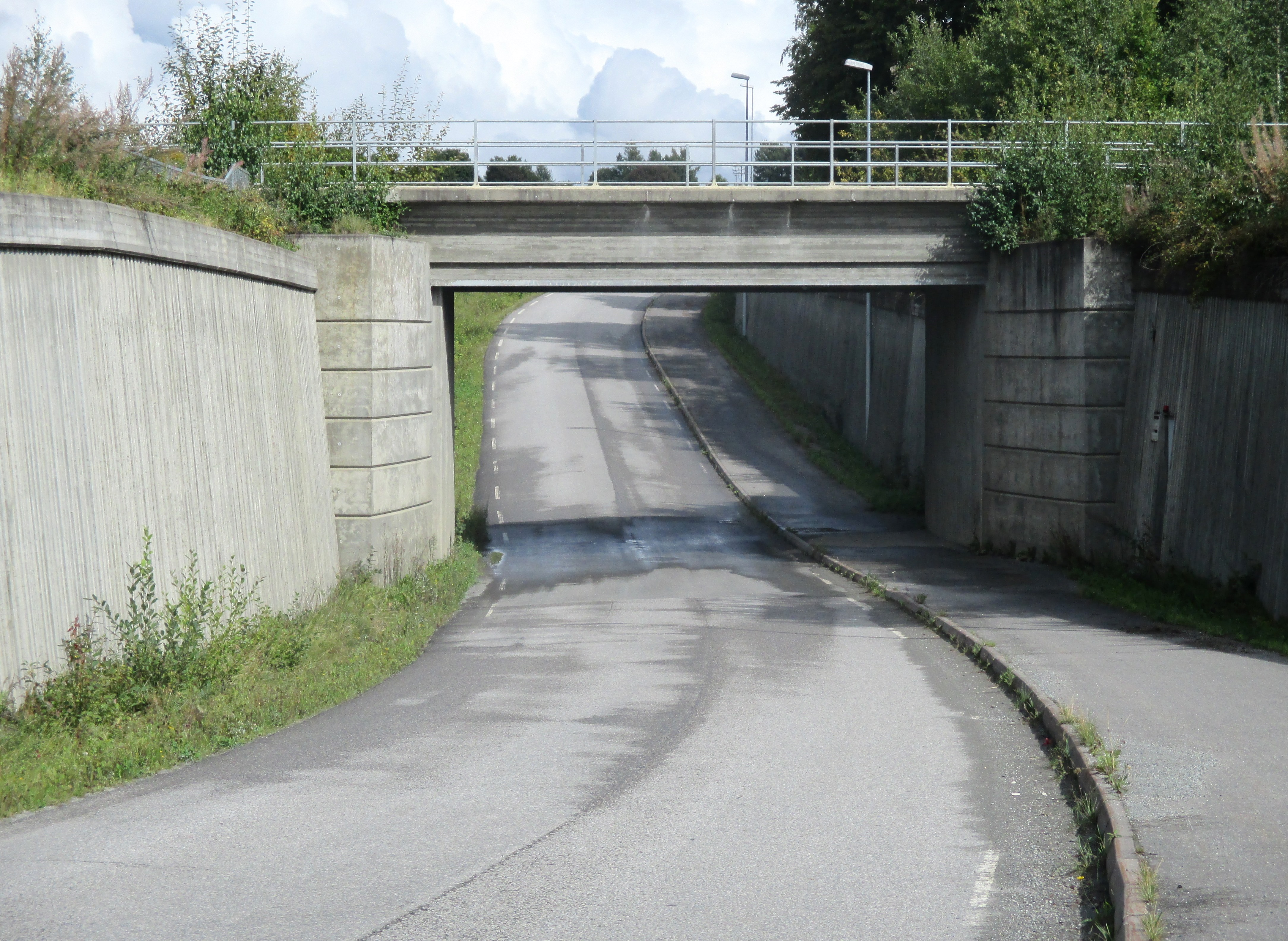 Hvervengutua (FV195) går i undergang under Dovrebanen nord for Ottestad stasjon.